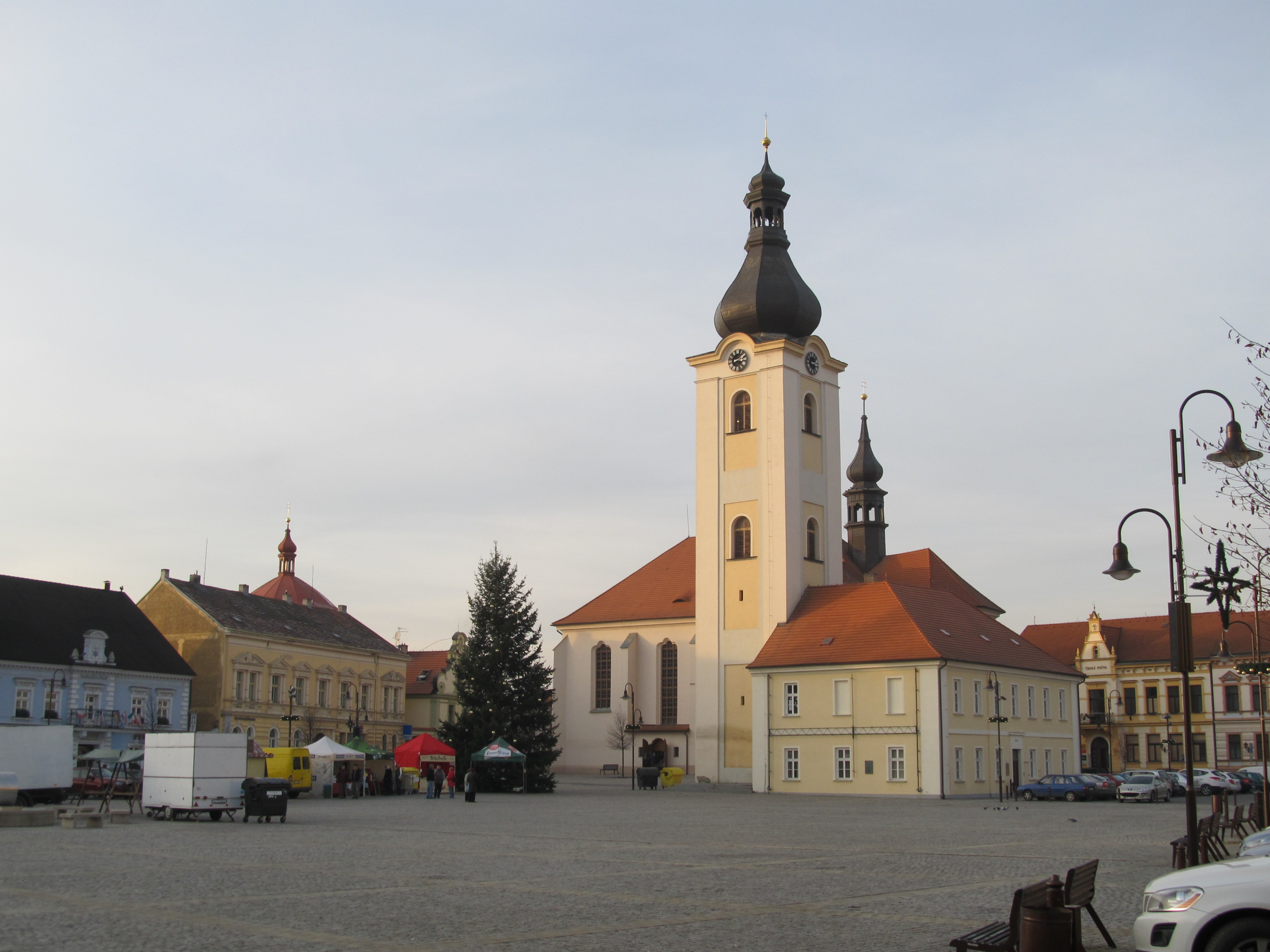 Dobřany - náměstí